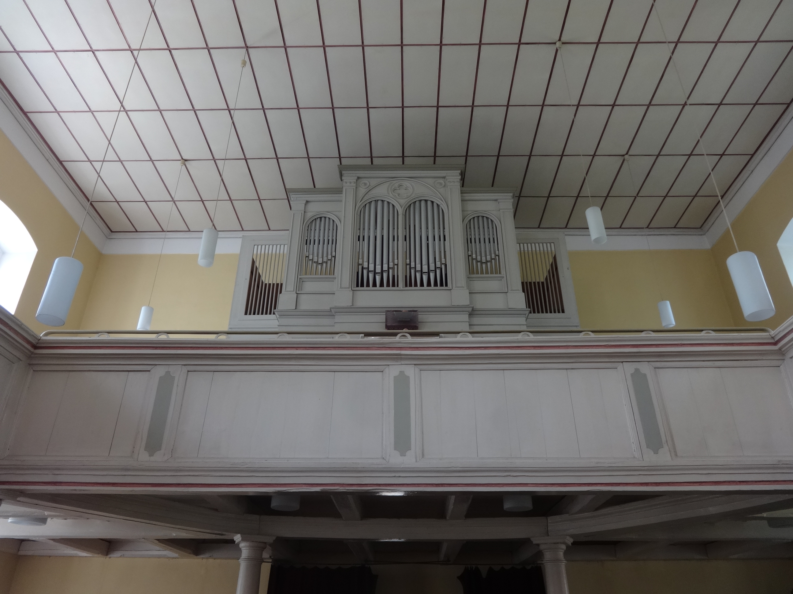 Die Dorfkirche in Sperenberg entstand in den Jahren 1752 und 1753 nach Plänen des Landbaumeisters Georg Friedrich Berger. Im Innern befinden sich zwei Altarleuchter eines Hamburger Reeders aus dem Jahr 1612 sowie ein Holzkreuz des Sperenberger Bildhausers Egon Liebold.